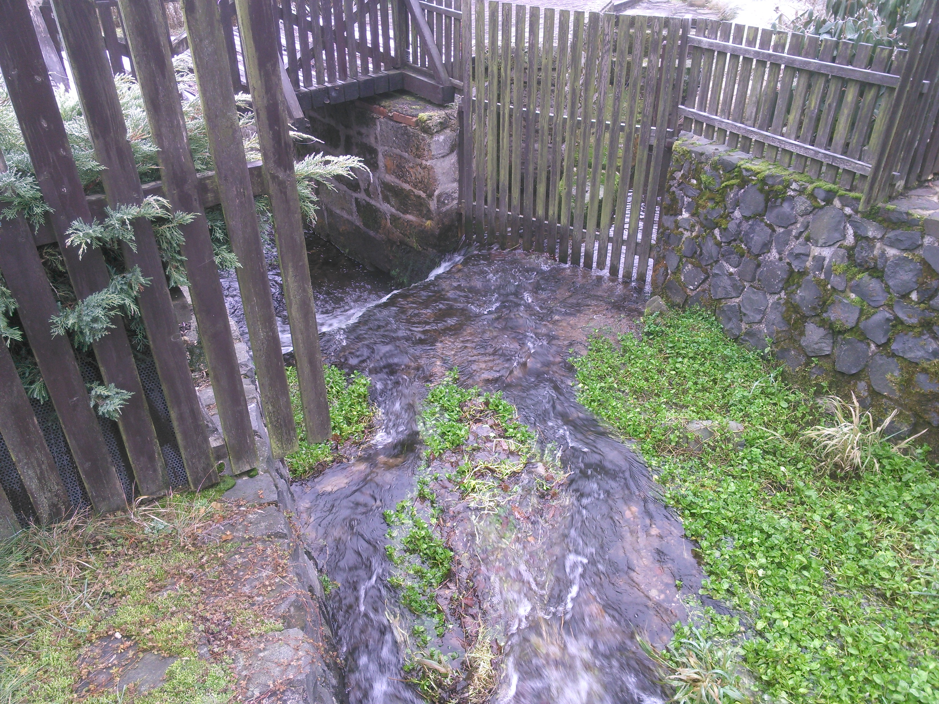 Potok.